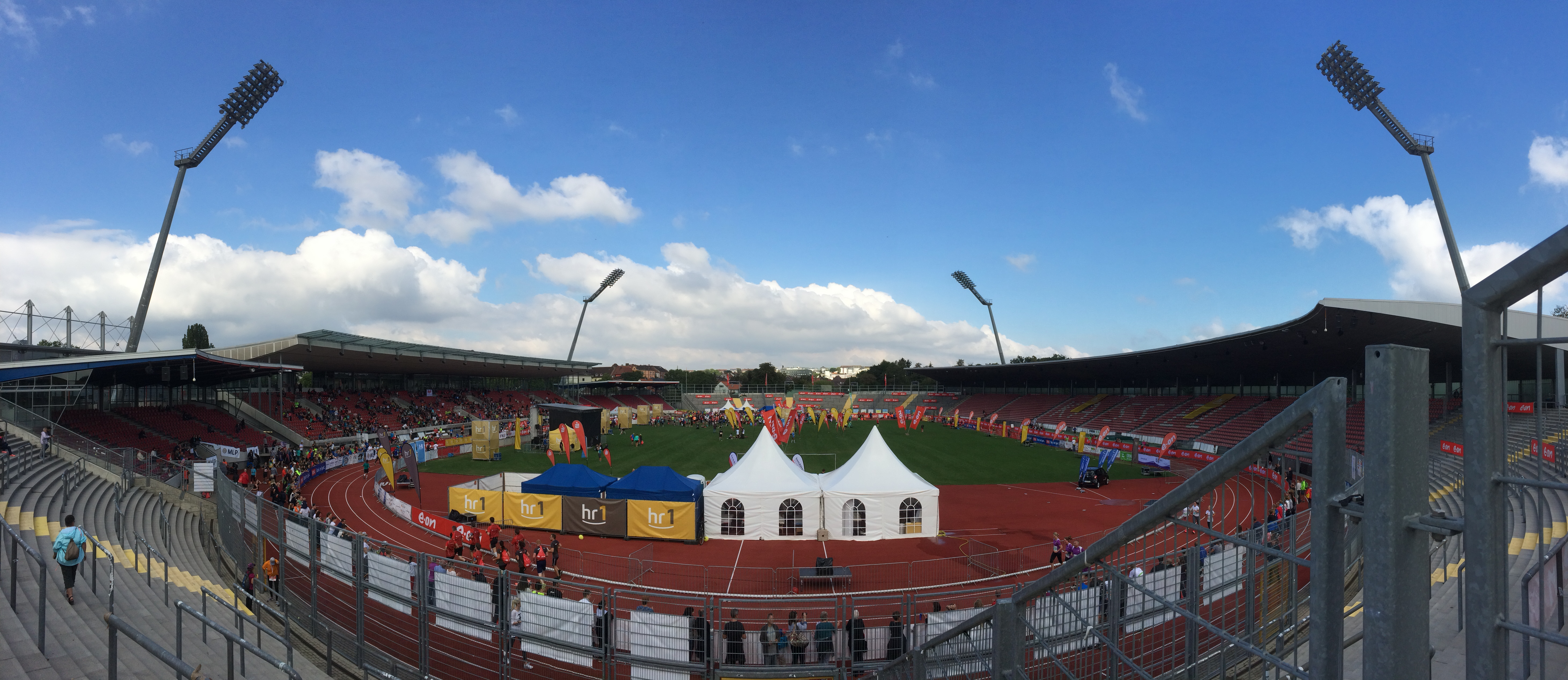 10. E.ON Kassel-Marathon 2016: Zielbereich im Auestadion